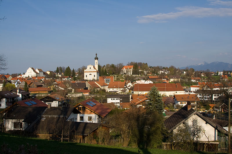 Murnau